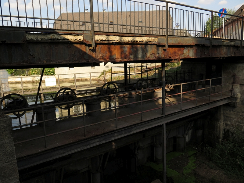 Vajgarský jez, Jindřichův Hradec I, Jindřichův Hradec III?, Jindřichův Hradec.